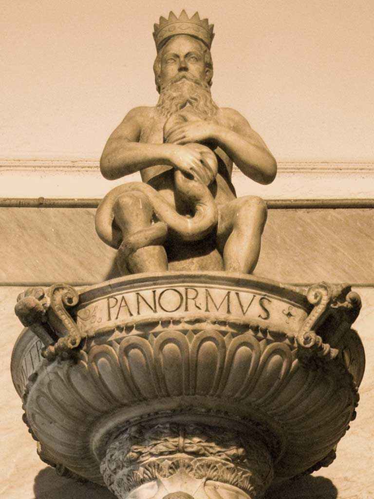 Il Genio di Palermo a Palazzo Pretorio, detto in siciliano Palermu u Nicu (Palermo il Piccolo).